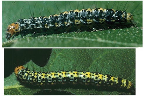 Ethmia delliella